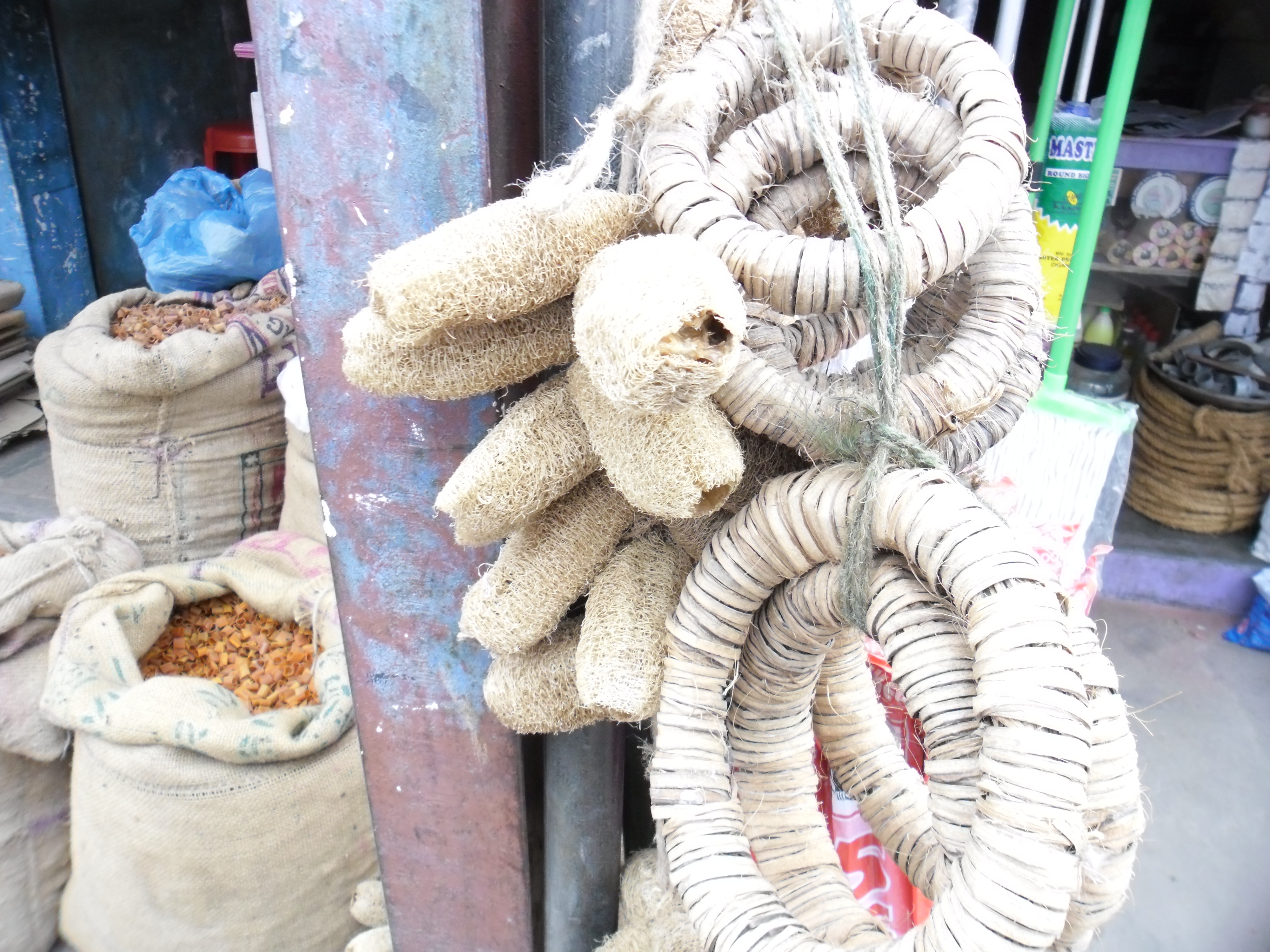 கடையில் விற்பனைக்காக வைக்கப்பட்டுள்ள பரணைகள் (வட்ட வடிவில் இருப்பவை) இவை, பெரிய பாத்திரங்கள் நிலைகுலையாமல் இருக்க அடியில் வைக்கப்படும். பொதுவாக வாழைநாரில் செய்யப்பட்டிருக்கும்.